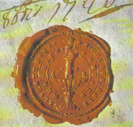 views of Alsenborn in Rhineland-Palatinate, Germany 1720 Gerichtssiegel, Alsenborn und Enkenbach